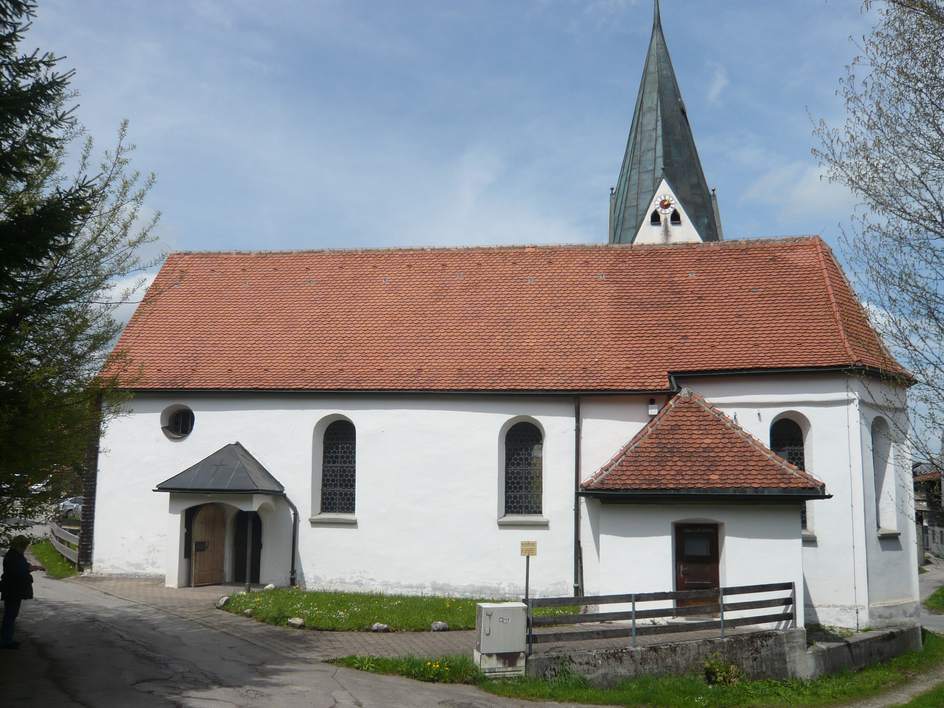 St. Martinskapelle in Kappel, Gemeinde Pfronten, Ostallgäu